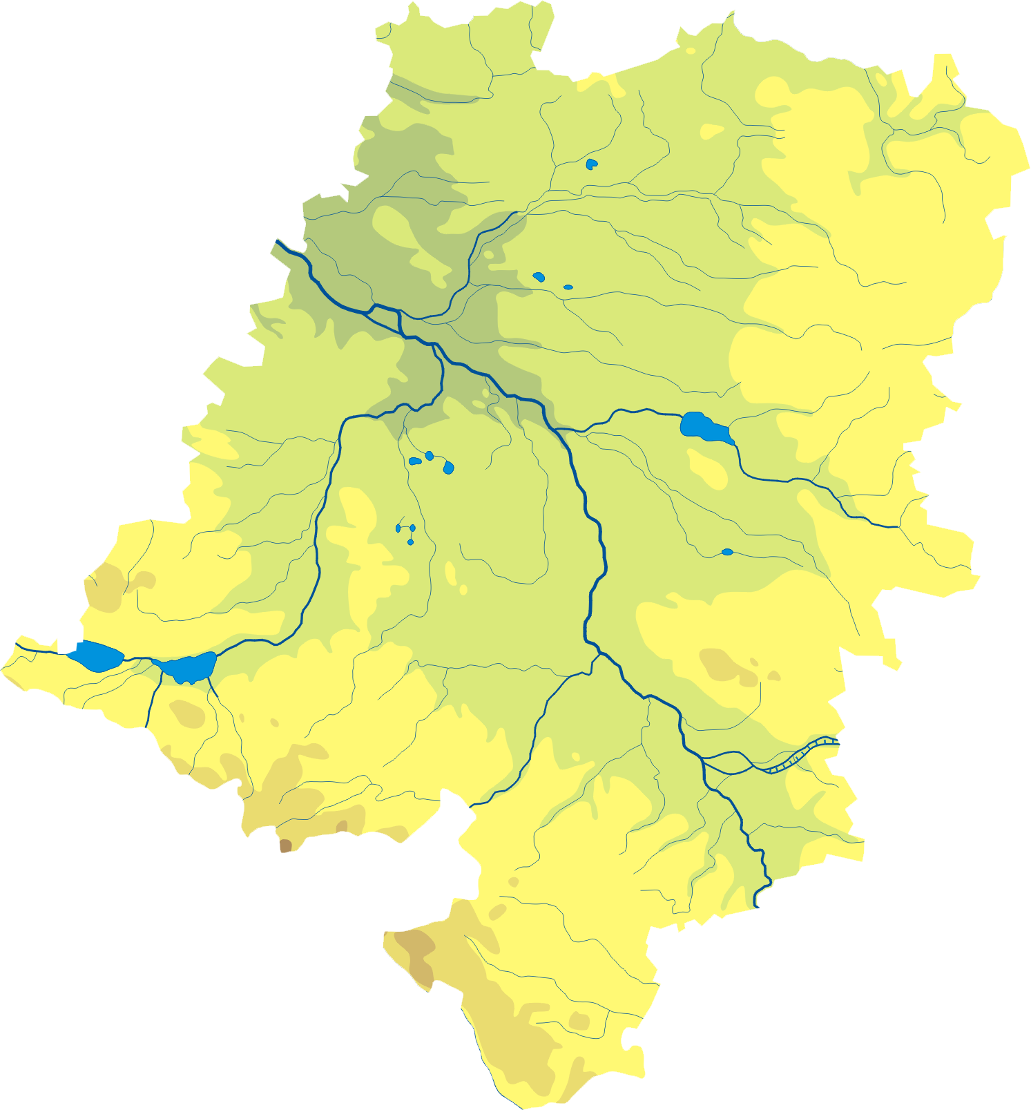 Mapa wód i ukształtowania powierzchni województwa opolskiego. Autor: AotearoaWspółrzędne graniczne mapy: N: 51.1945° N S: 49.9725° N W: 16.9082° E E: 18.6954° E Legenda